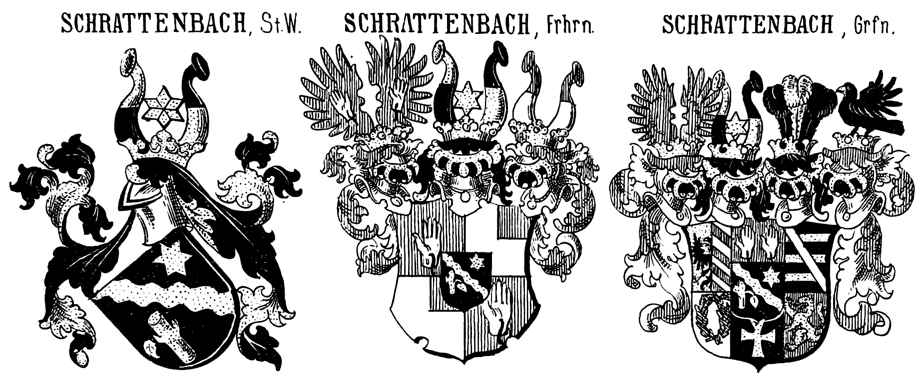 Drei Wappen der von Schrattenbach